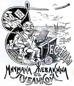 Рубрика "Беседы с мичмана Жевакина с публикой" в журнале "Развлечение". "Мичман Жевакин" - псевдоним Ивана Андреевича Вашкова